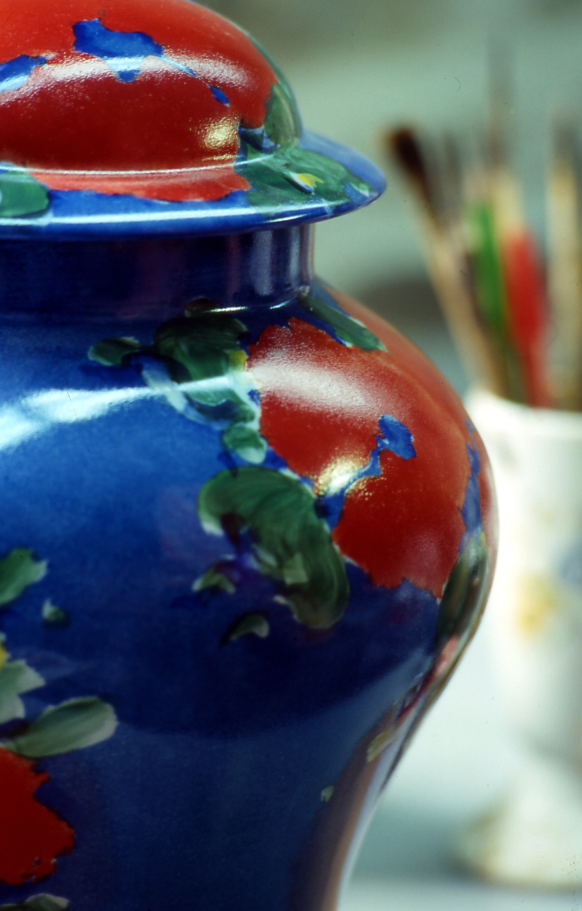 Oeuvre en porcelaine